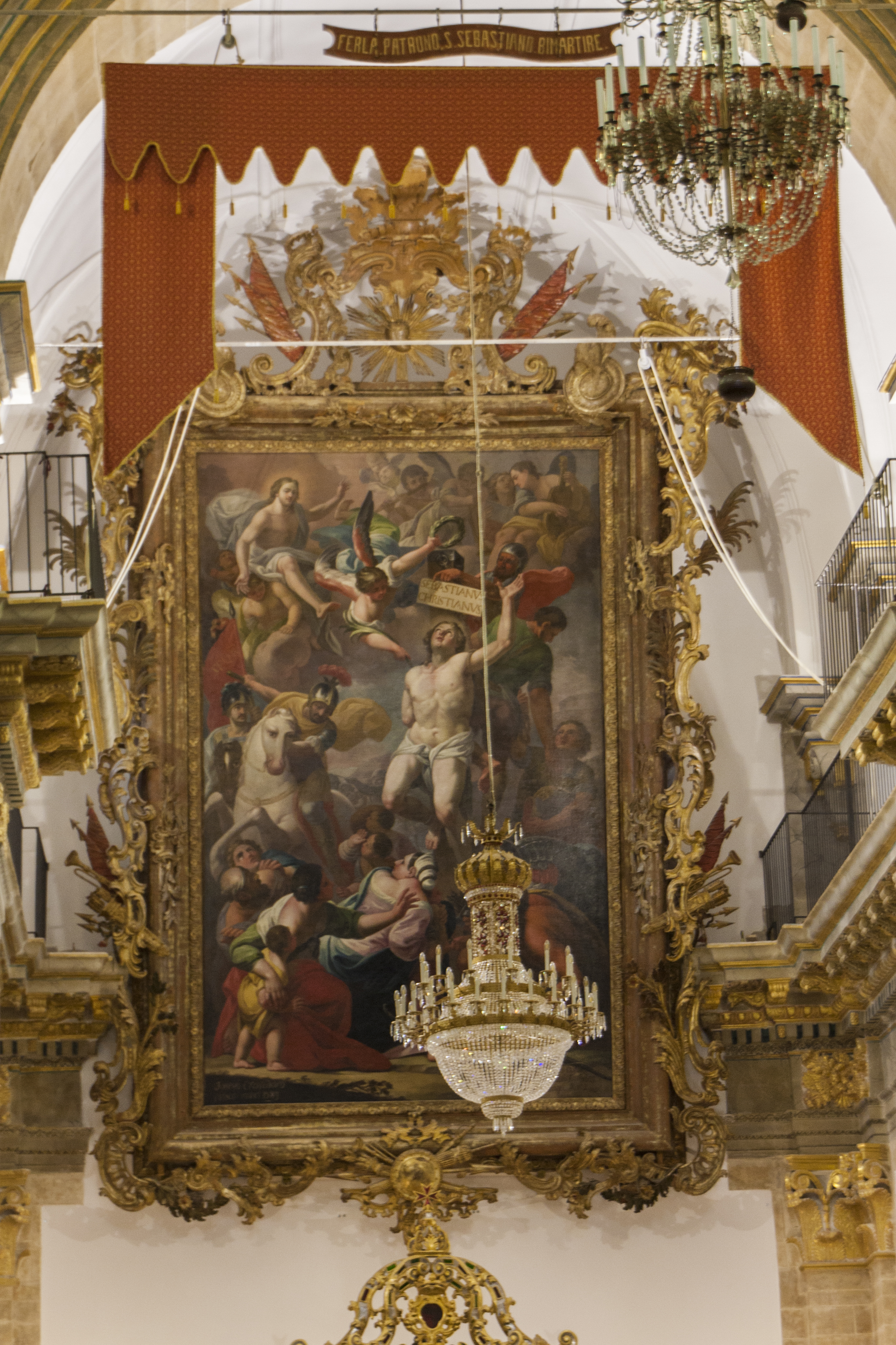 Tela di Giovanni Crestadoro